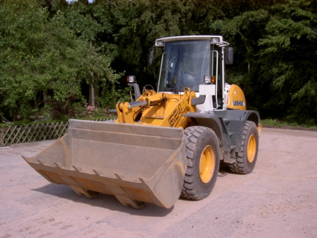 Radlader Liebherr L524